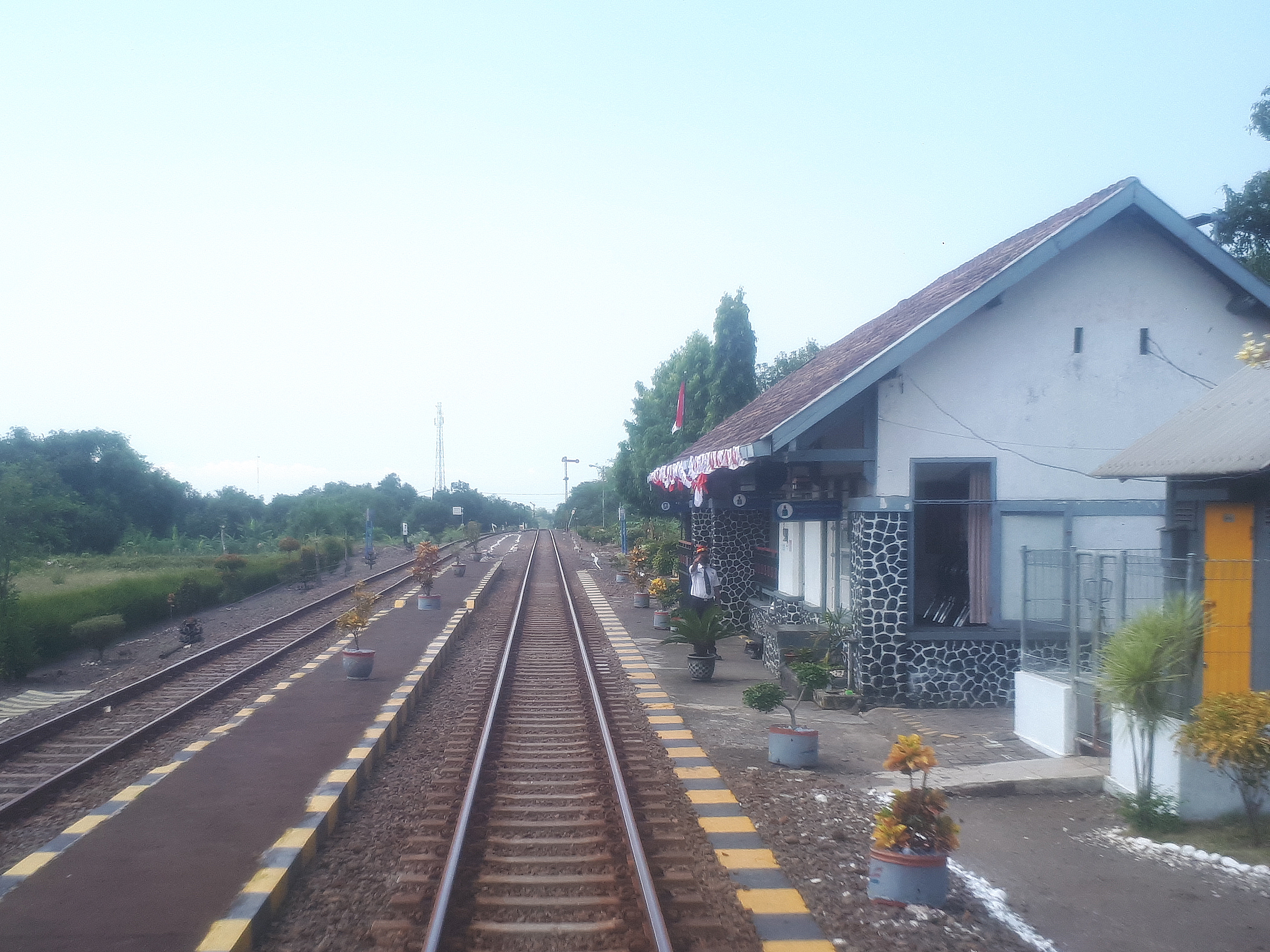 Emplasemen Stasiun Wonokerto pada tahun 2020